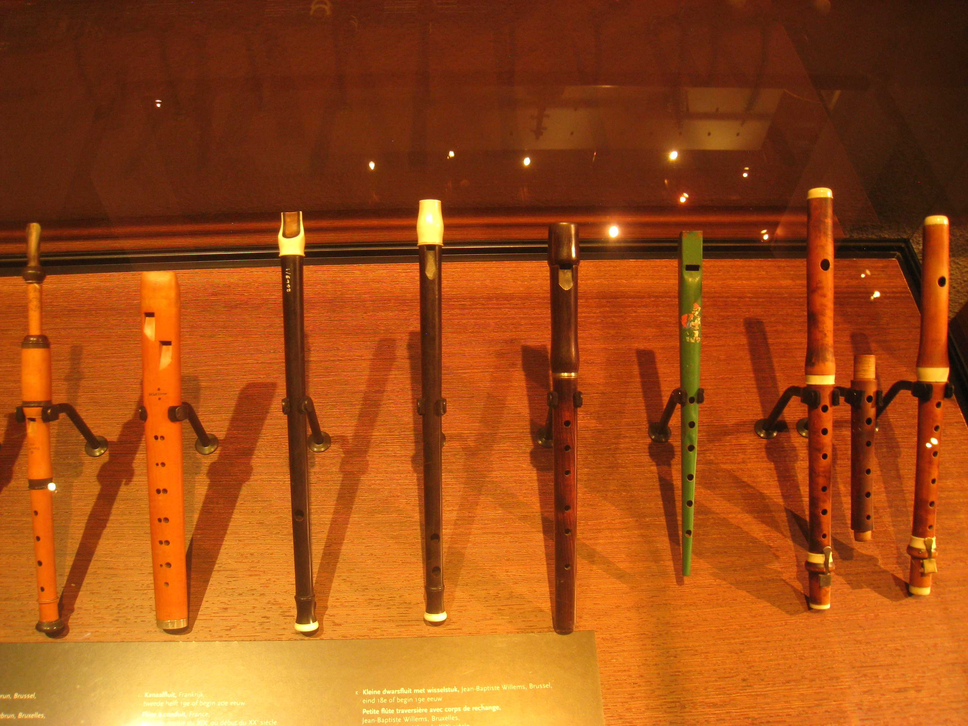 Wind instruments in the Musical Instrument Museum, Brussels, Belgium.